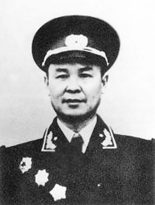 韦国清上将授衔照。